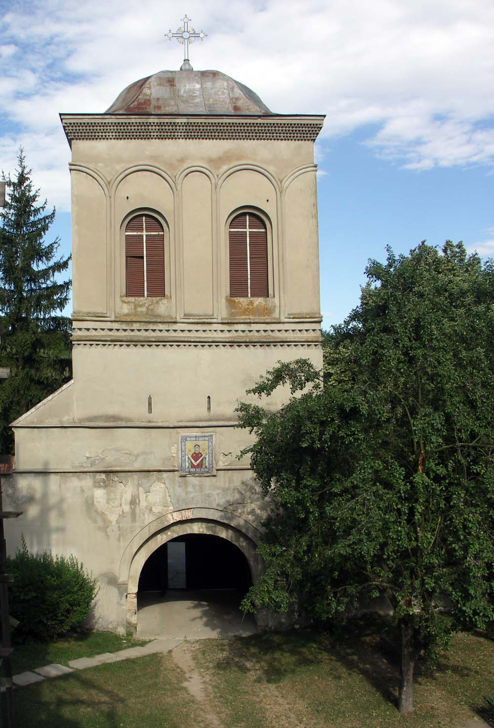 Mănăstirea Gura Motrului. Clopotniţa. 04